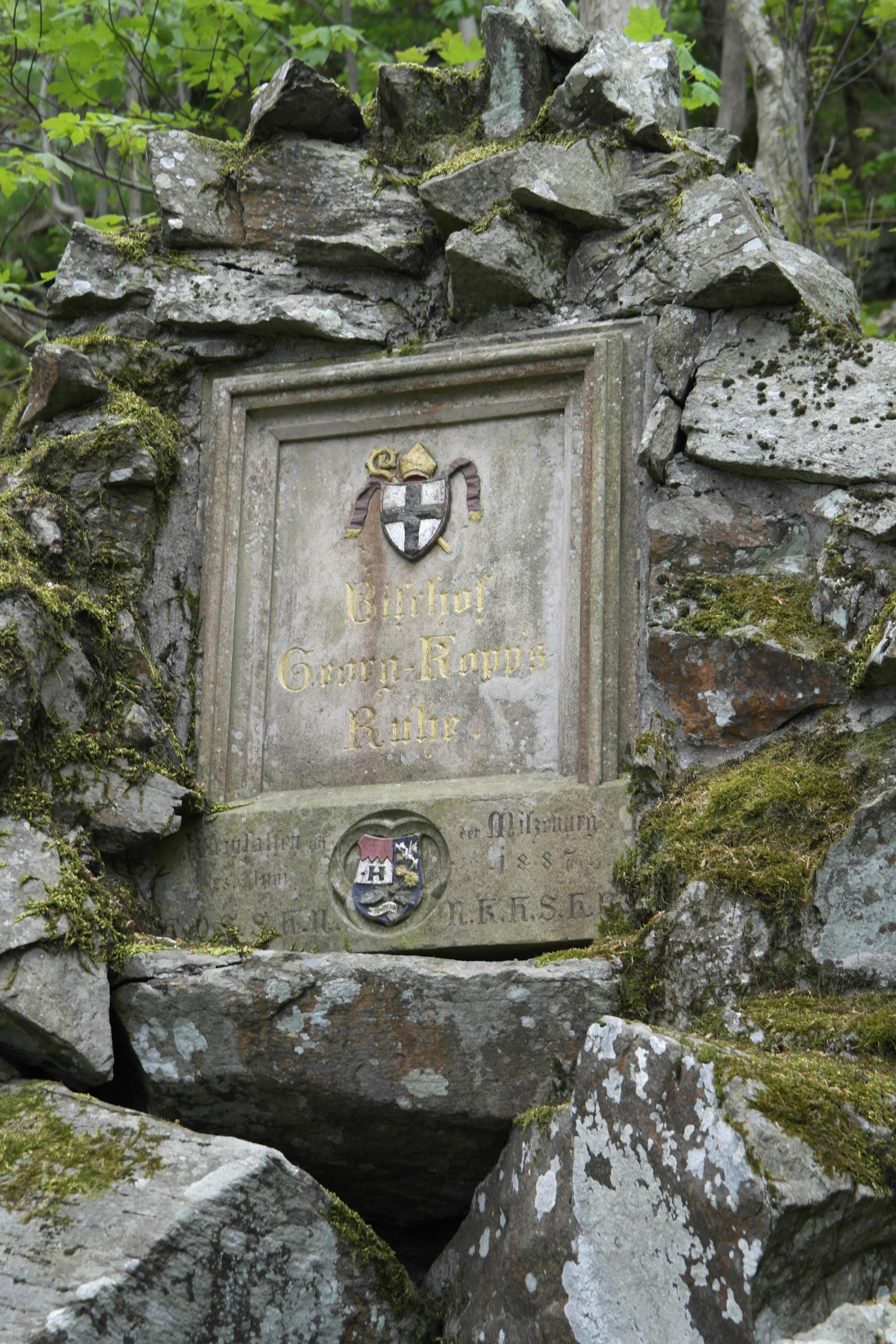 (NSG:HE-1631003)_Milseburg. Hessische Rhön-Milseburg (835m) gehört zu den grössten und wichtigsten vorgeschichtlicher Besiedlung Osthessens. Die ersten Besiedlung ist aus der Zeit 1200 bis 800 vor Christus belegt.. Gedenkstein für Bischof Georg Ropp.